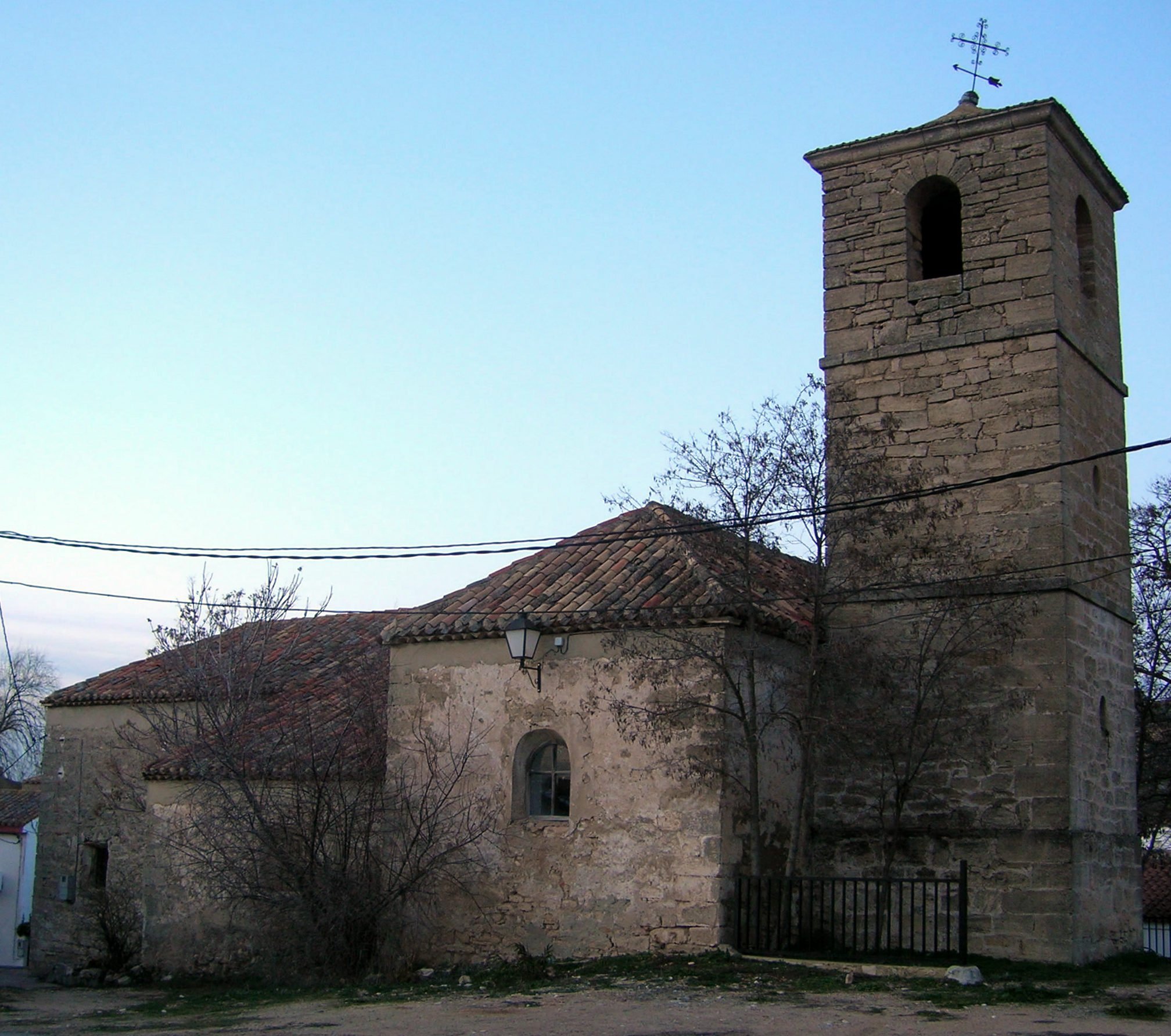 Iglesia de Masegoso, municipio de Albacete, en España.